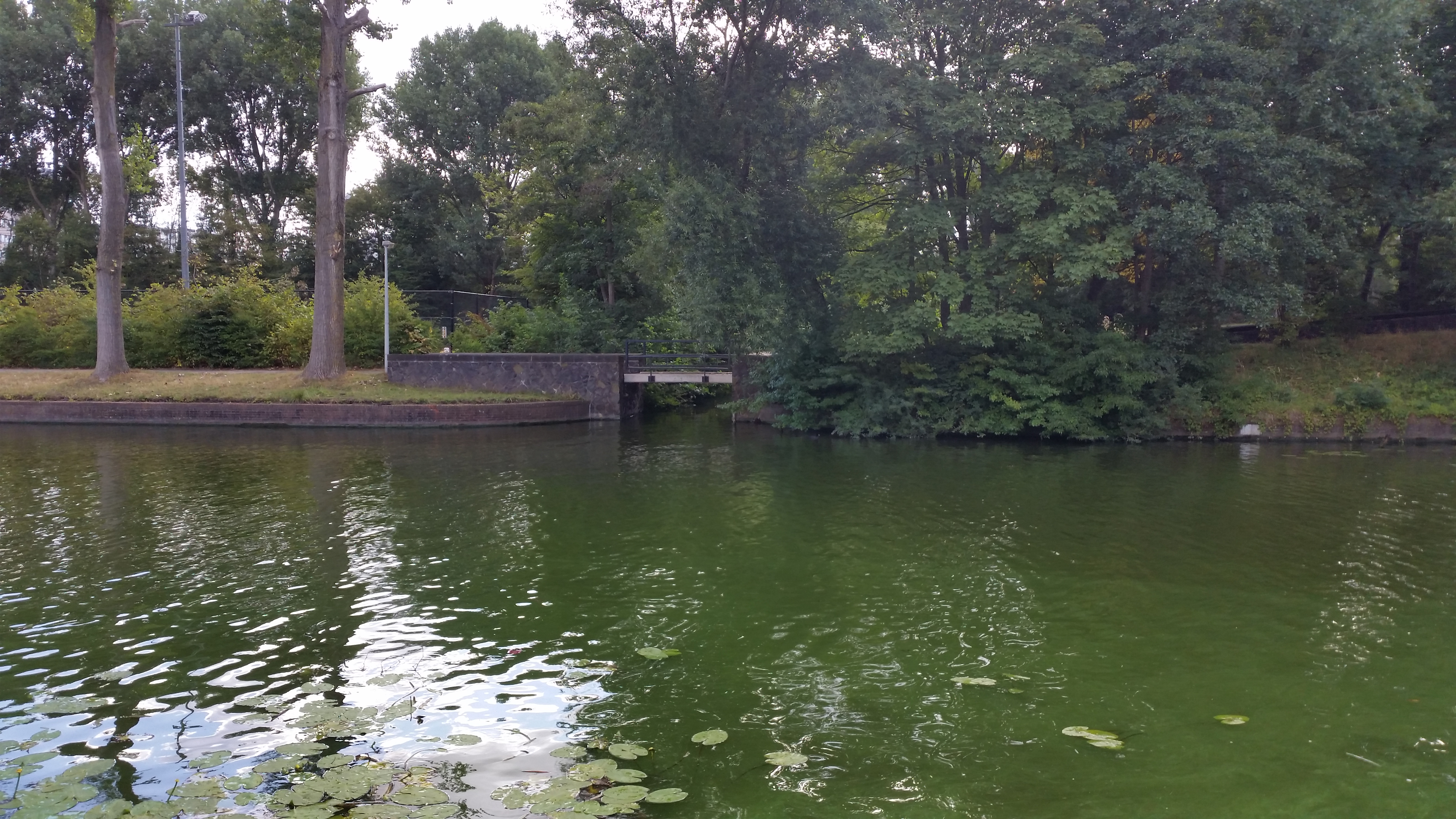 Brug 632 (in Amsterdam) met op de voorgrond de Burgemeester Cramergracht